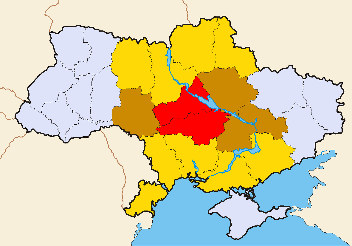 Регионы, относимые к центральной Украине всегда часто иногда